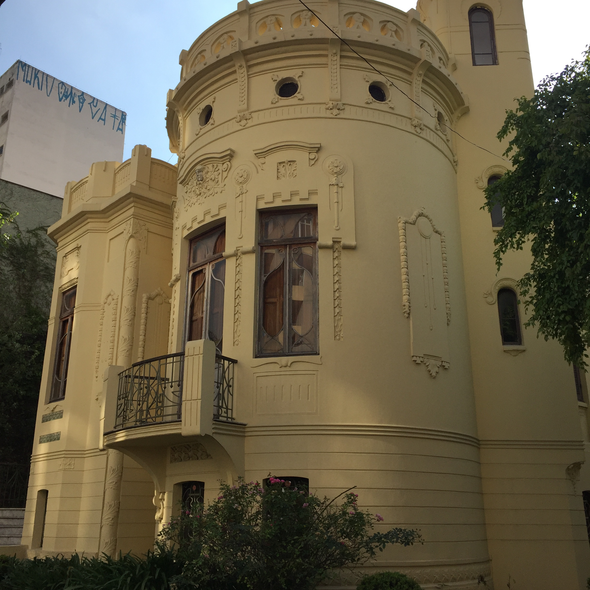 Face frontal do Castelinho da Brigadeiro, em São Paulo (SP), Brasil